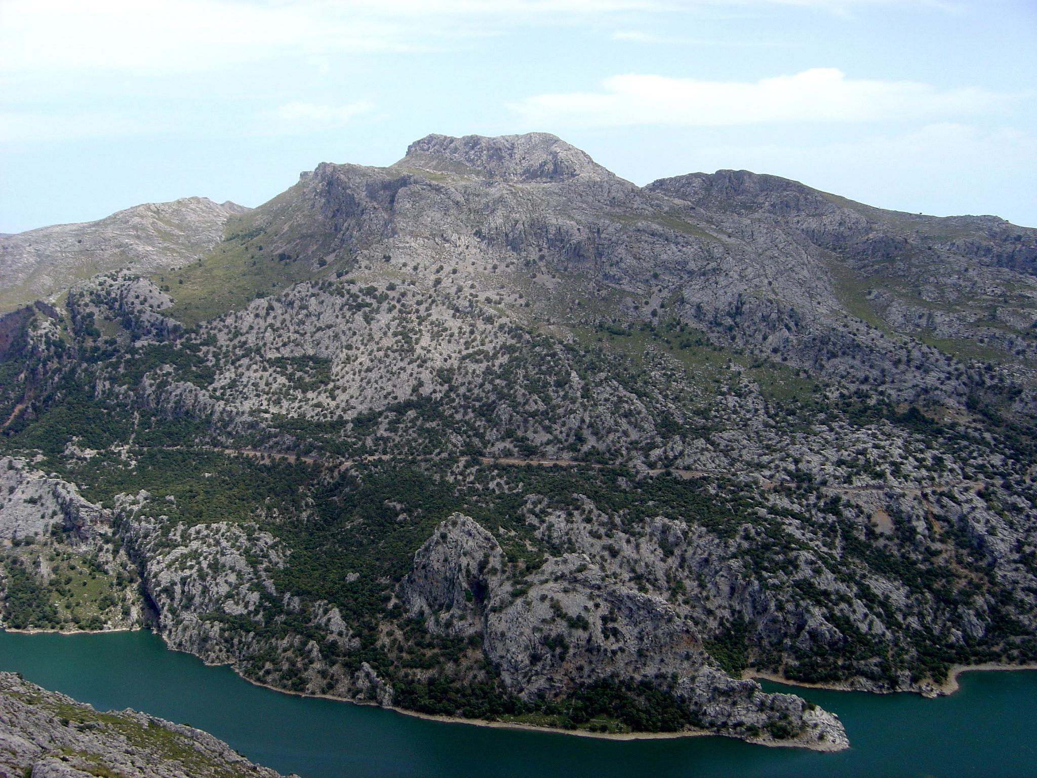 Massanella, vist des del Puig de Ses Vinyes. Escorca. Mallorca.